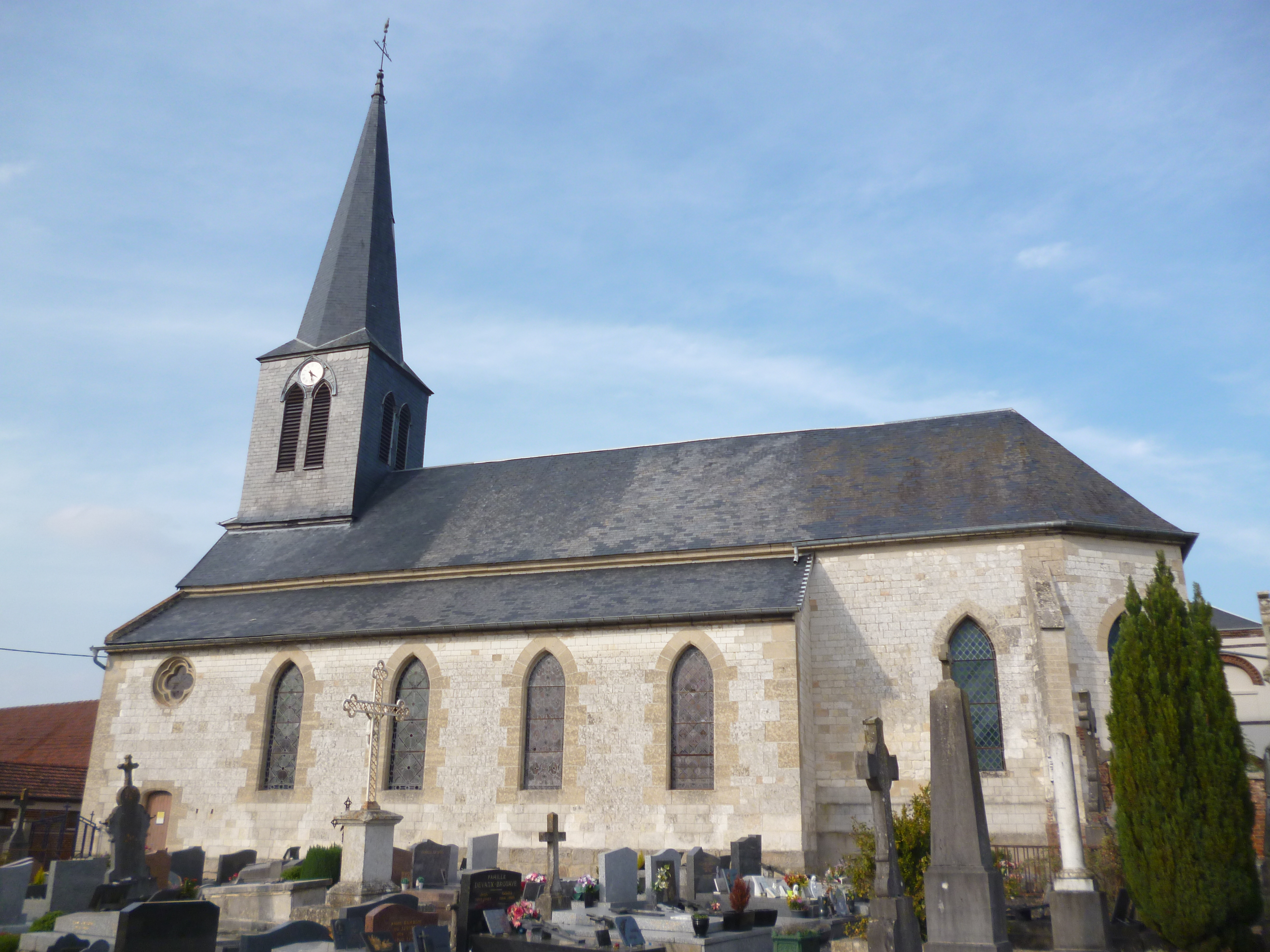 Eglise Saint-Firmin et cimetière de la commune du Mesnil-Saint-Firmin (Oise).